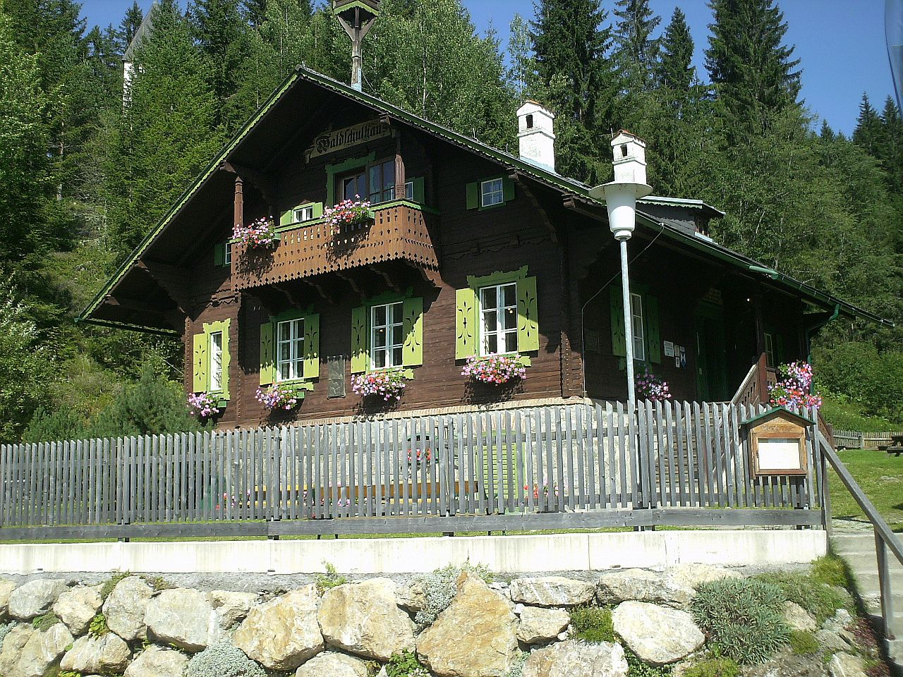 Museum/Ausstellungsbau, Schule, Waldschule in Alpl bei Krieglach/Österreich.